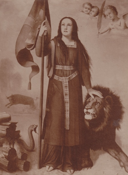 Fahnenbild der Hl. Thecla , Gemälde von Franz Thöne 1902 für das Franziskanerkloster in Paderborn